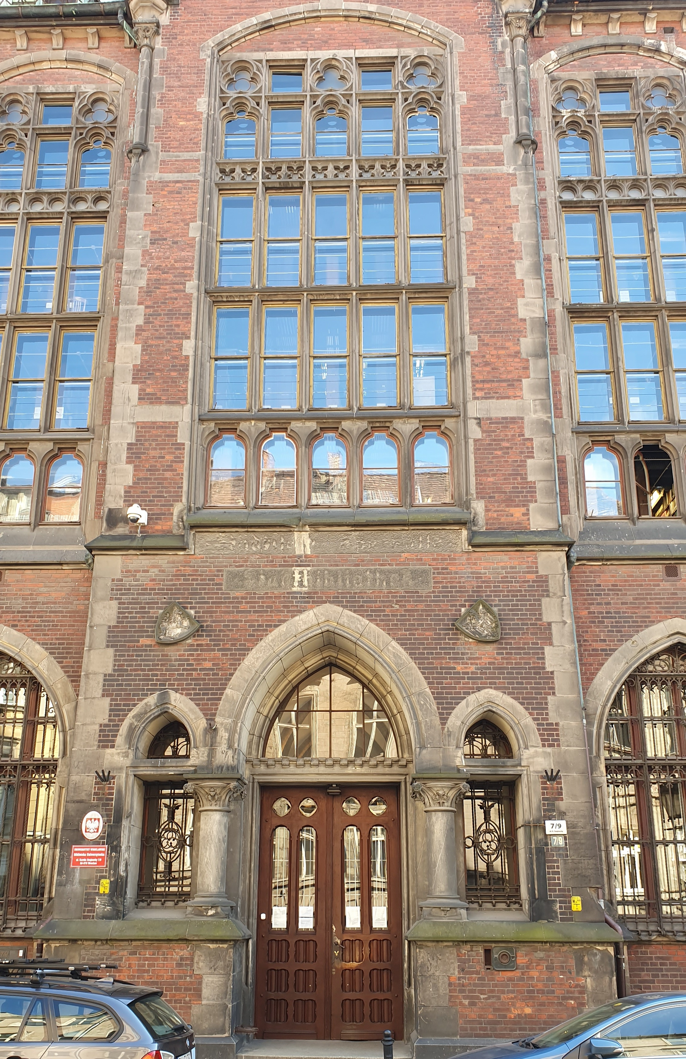 Portal wejściowy do Biblioteki Uniwersytetu Wrocławskiego przy ul. Karola Szajnochy we Wrocławiu